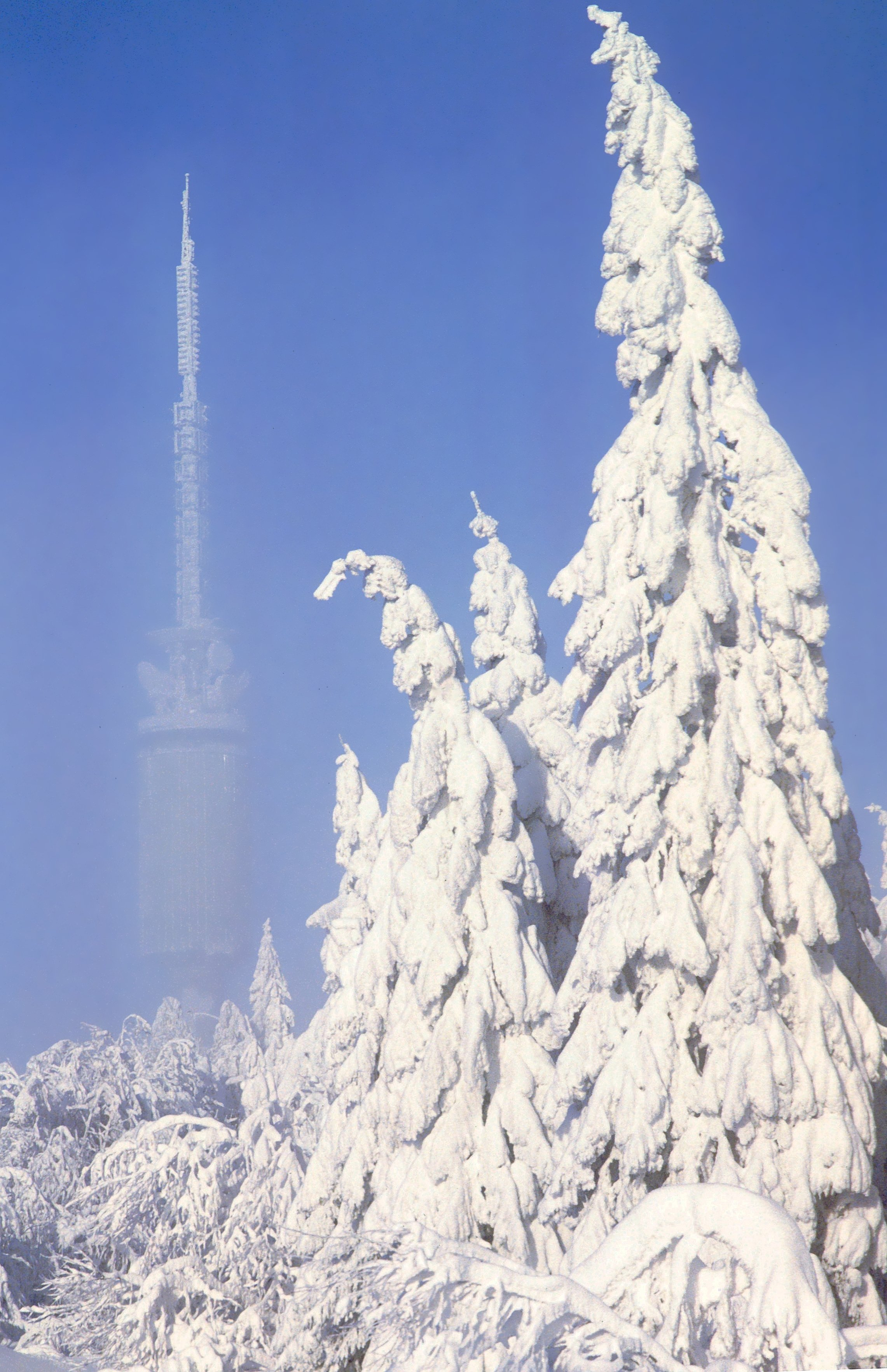 Tryvannstårnet